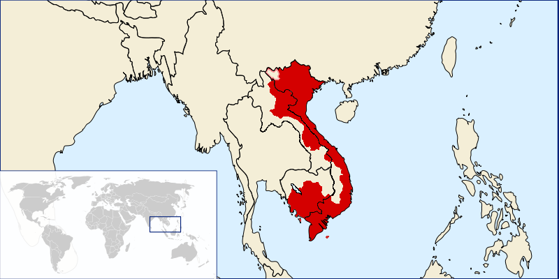 Việt Nam dưới thời Minh Mạng, bao gồm cả các trấn ở Lào và Campuchia ngày nay. Vẽ đè lên biên giới ngày nay.